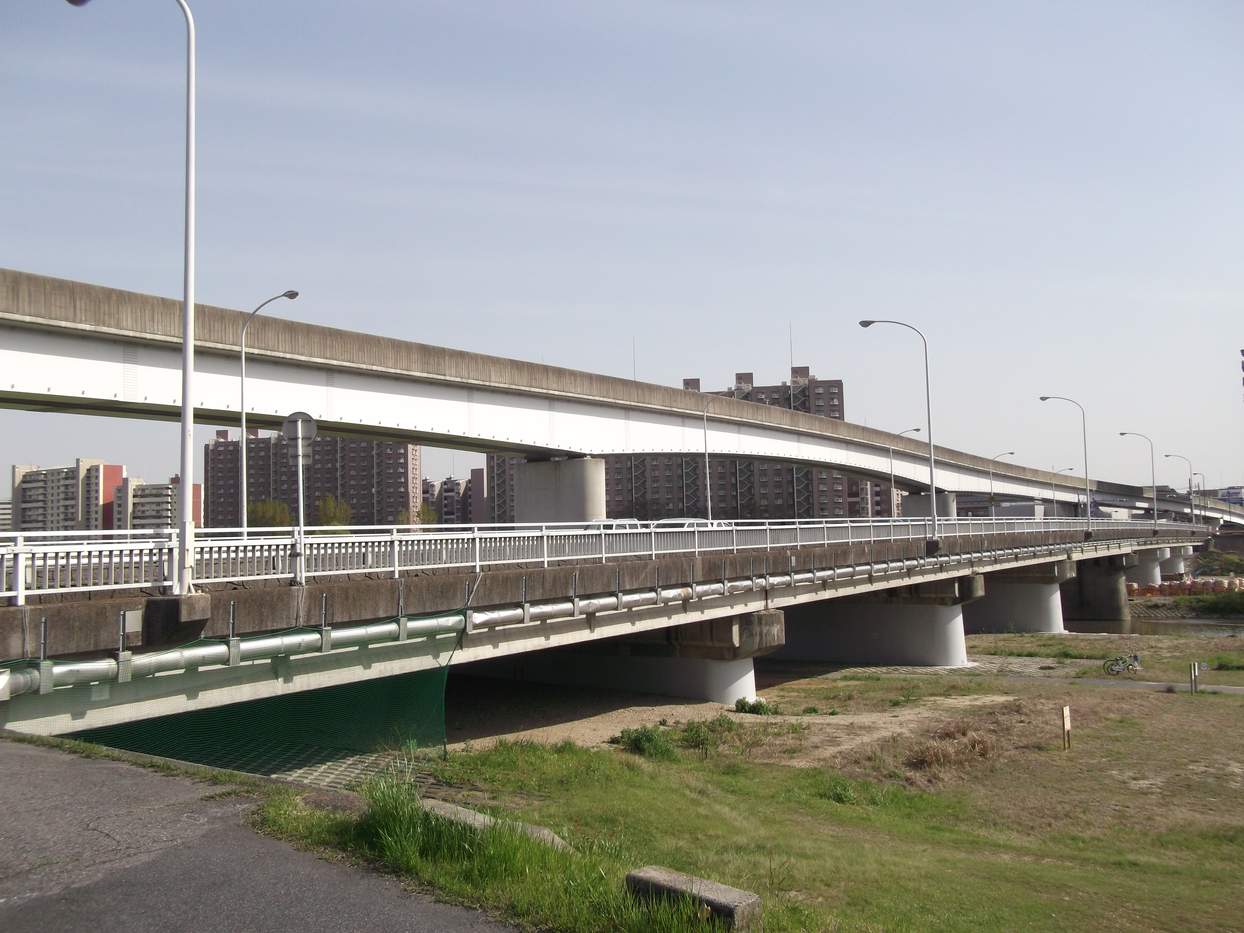 名古屋市守山区・東区の矢田川に架かる宮前橋を北西側より撮影